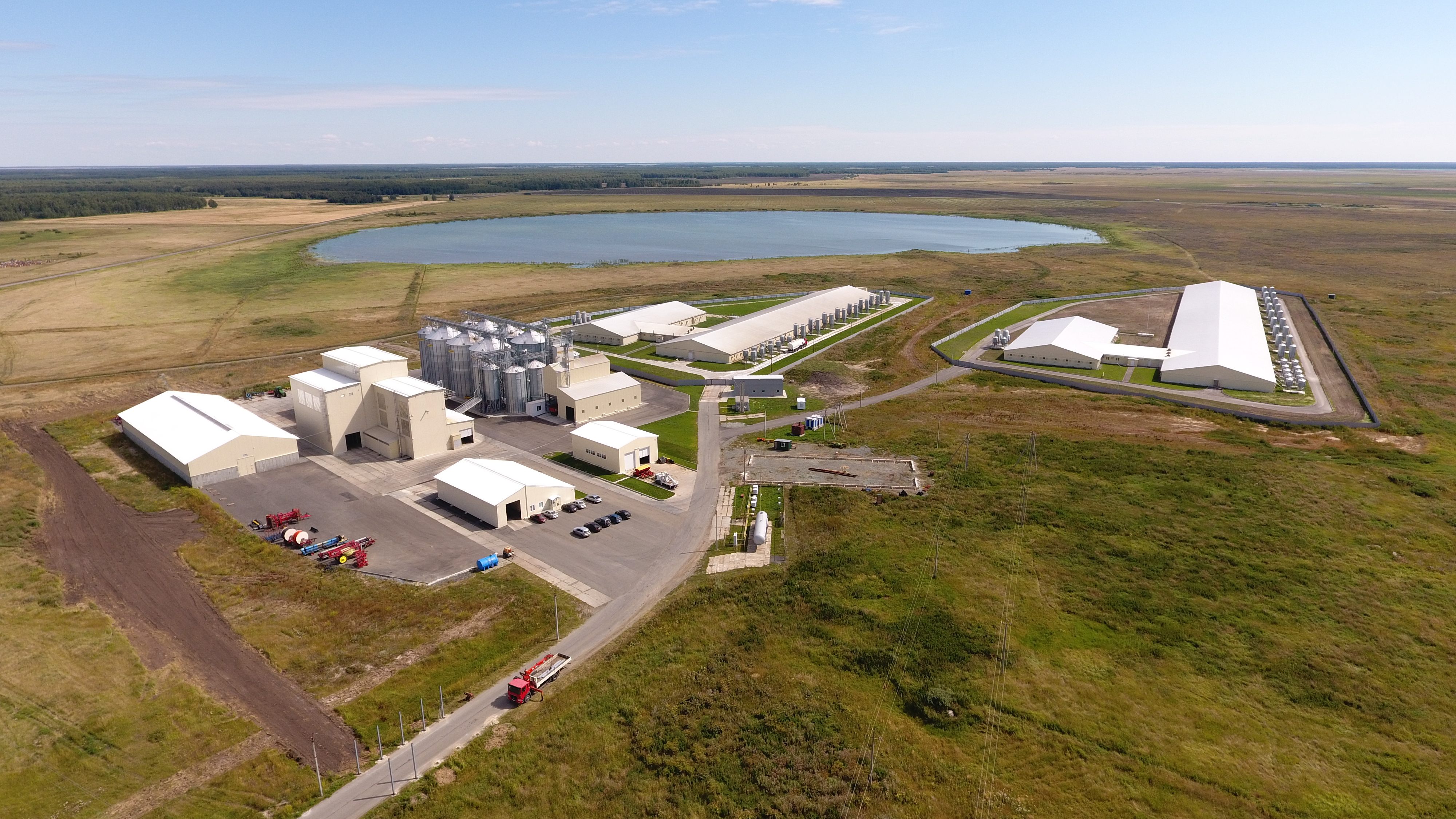 Свинокомплекс, комбикормовый завод и элеватор.